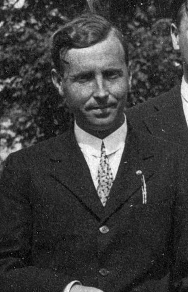 vitéz Somogyváry Gyula író (Gyula diák)